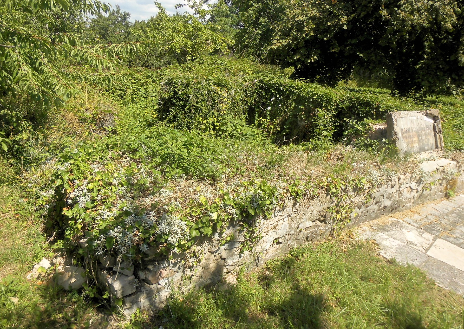 Les vestiges antiques de la rue des Romains à Kœstlach